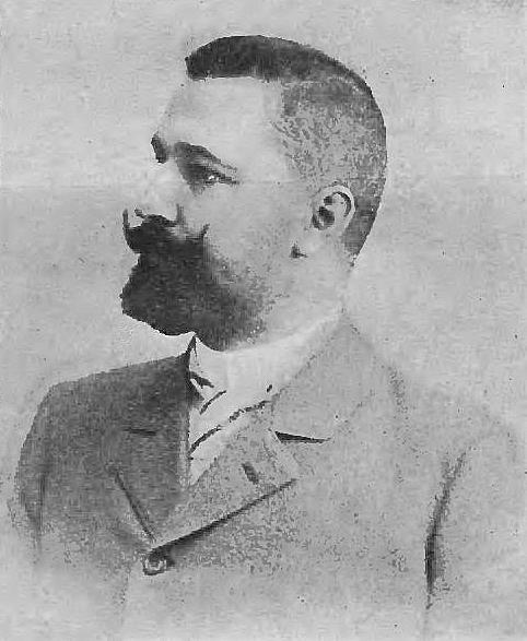 Józef Hanczakowski (-1907)